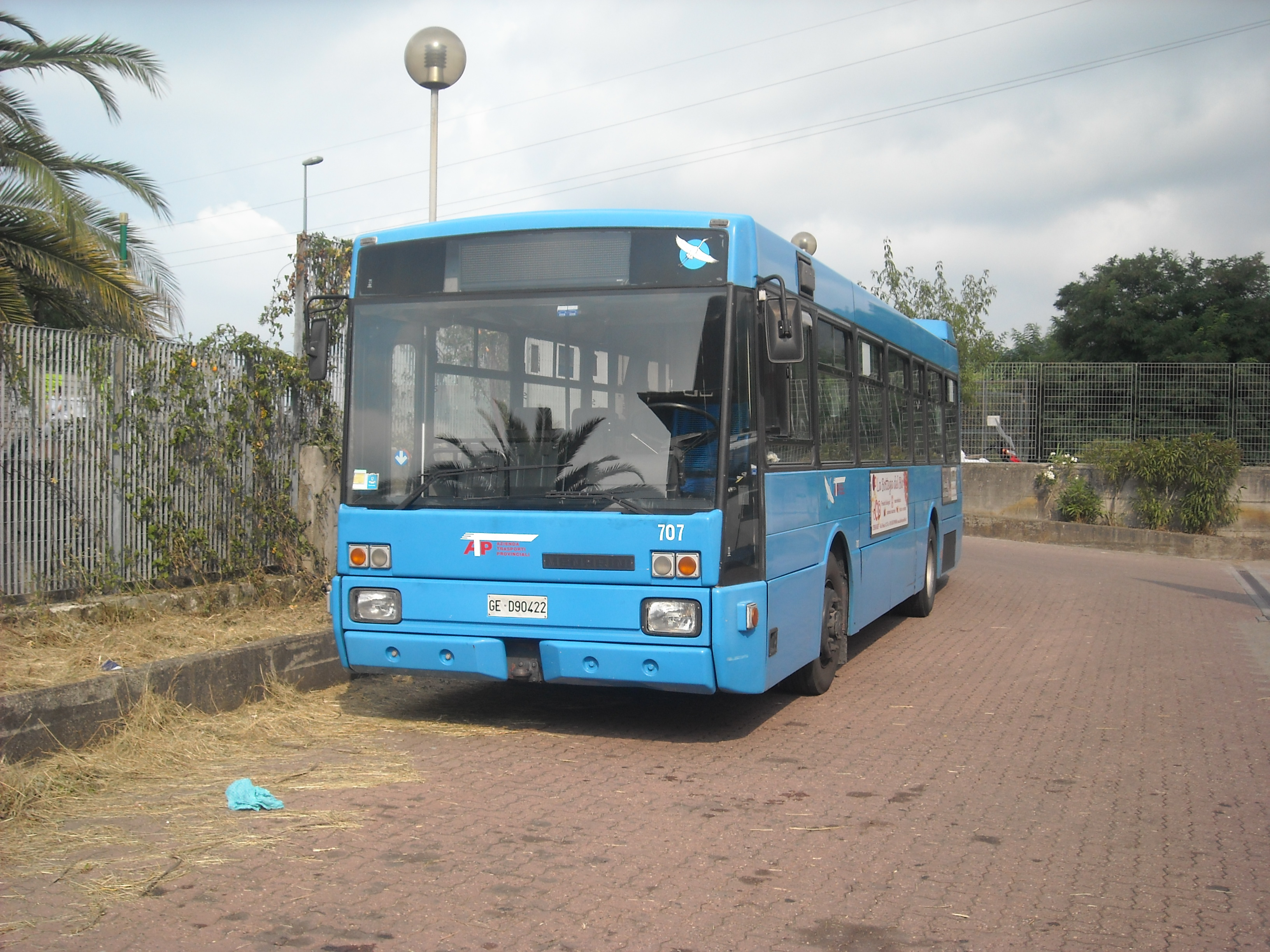 Menarini 220 NI di ATP Genova vettura 707